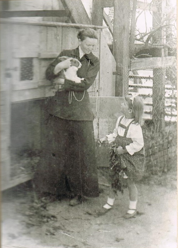 Fotografie von Erminia von Olfers-Batocki (1876-1954)